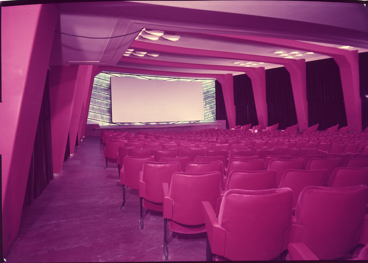 Architetto Gerli, Cinema Ambasciatori. Platea e Galleria. Servizio fotografico : Milano, 1970 / Paolo Monti. - Buste: 2, Fototipi: 2 : Diapositiva, sviluppo cromogeno/ pellicola ; 13x18. - ((Serie costituita da 2 buste sciolte di diapositive identificate con i nn.: 1160, 1161. - I negativi presentano segni di degrado? (alterazione tonale). - La suddetta serie è contenuta nella scatola GC1155-1174, formato 18x124, e identificata con l'iscrizione didascalica manoscritta a pennarello nero: "Negat./ Diapositive". - Fonte: Rubrica di Paolo Monti: Archivio 10x12 (ultimi numerati) - dal G1 al (s.d.), presso Archivio Paolo Monti